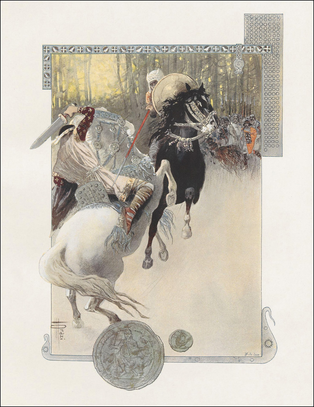 Ilustrace k eposu Huon de Bordeaux